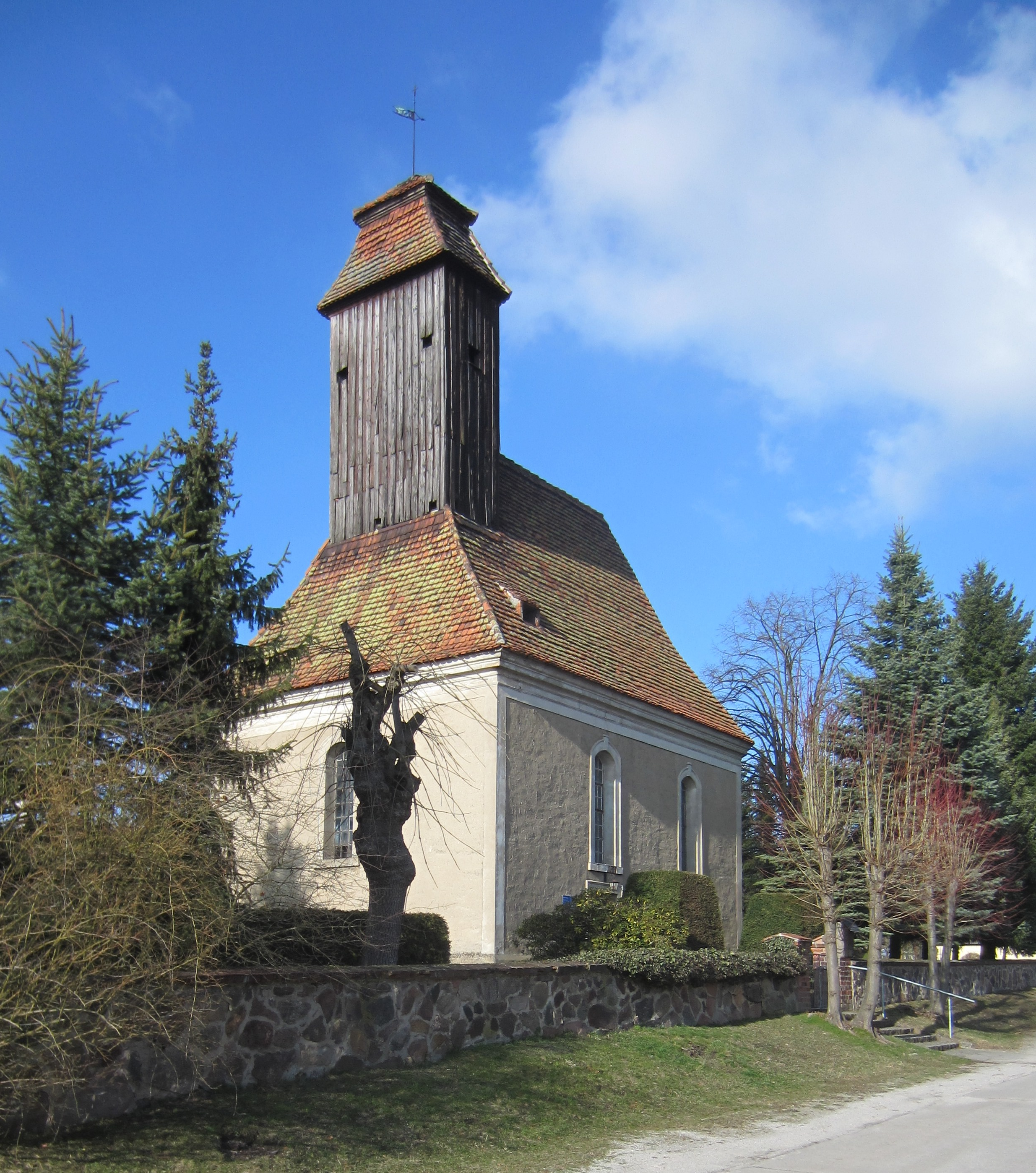 Babben, Gemeinde Massen-Niederlausitz, denkmalgeschützte Dorfkirche, Südwestansicht